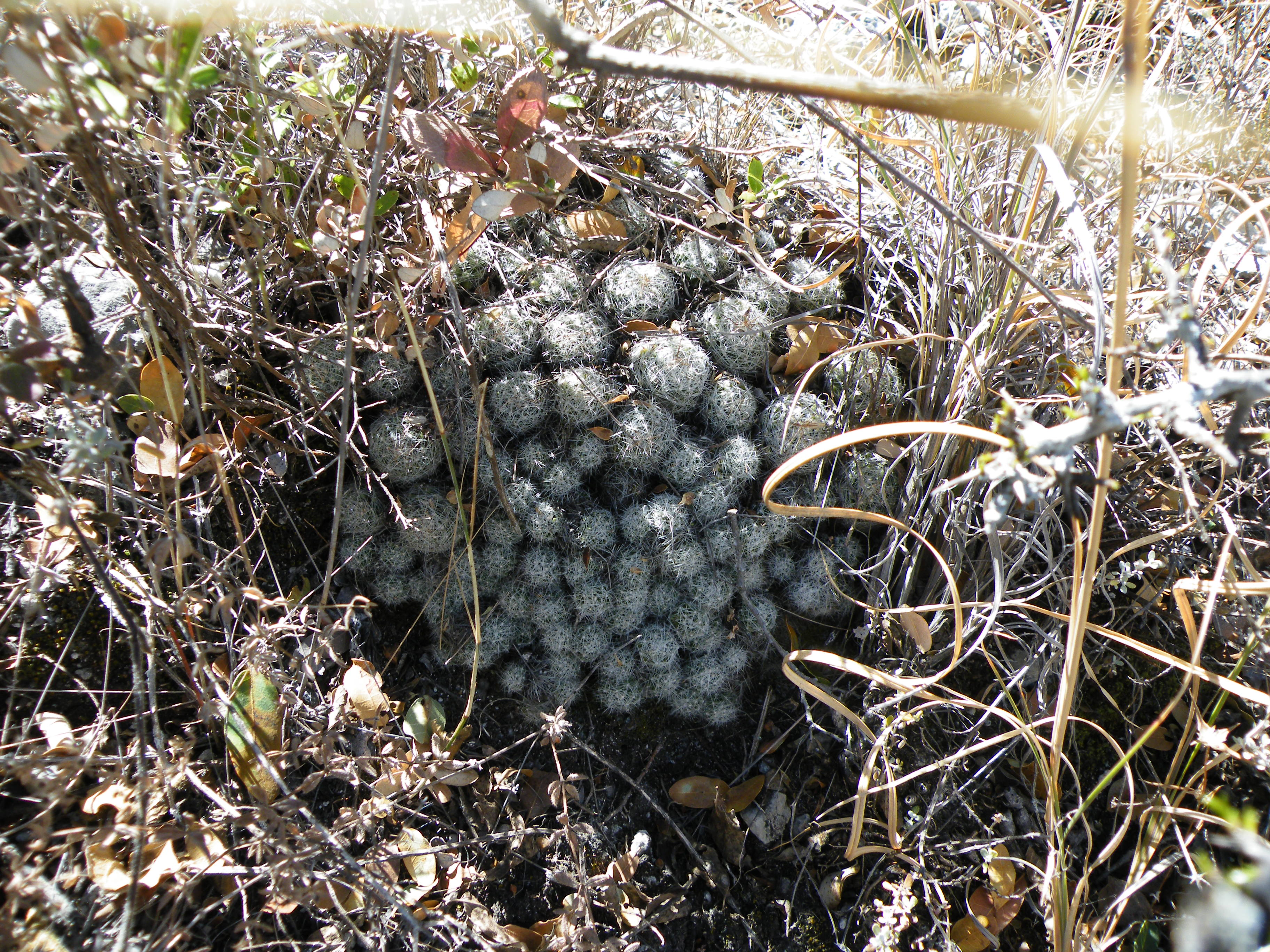 Villa Tejupam De La Union, Oaxaca